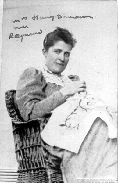 reynaud